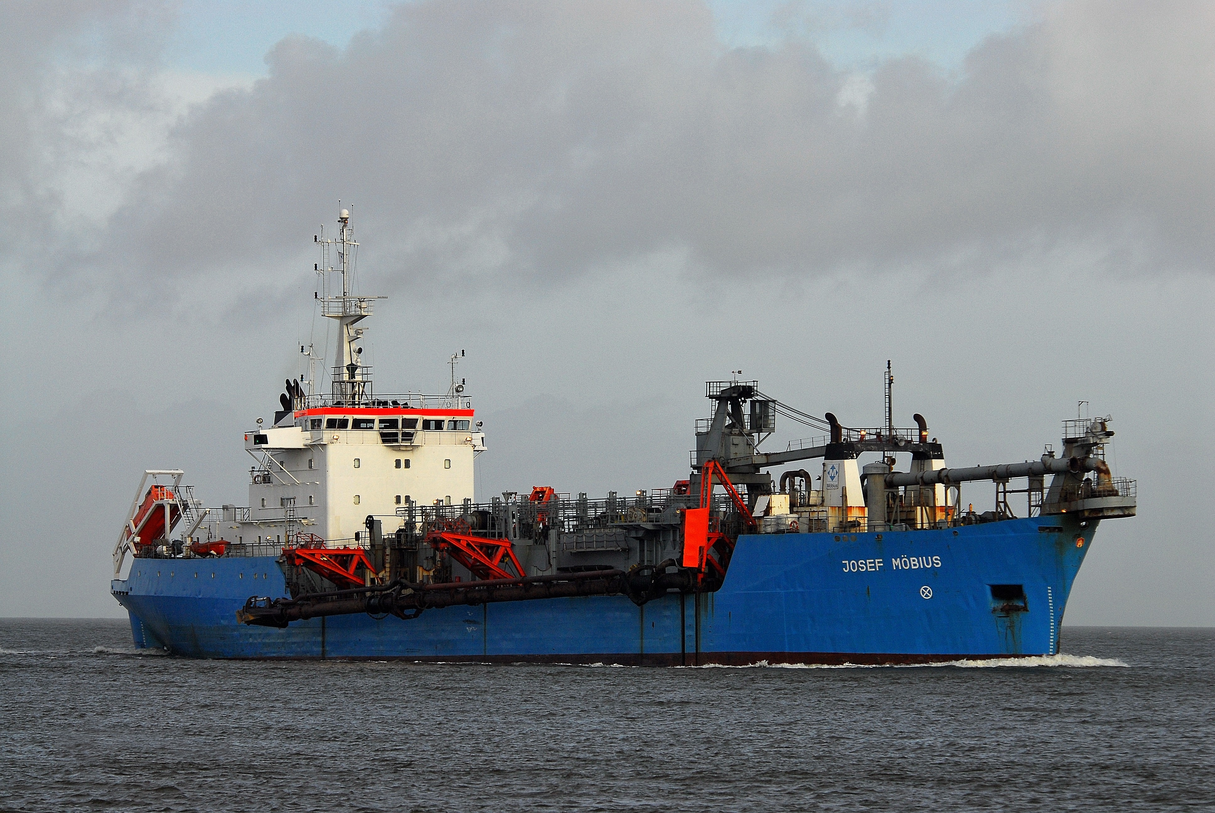 In der Elbmündung vor Cuxhaven